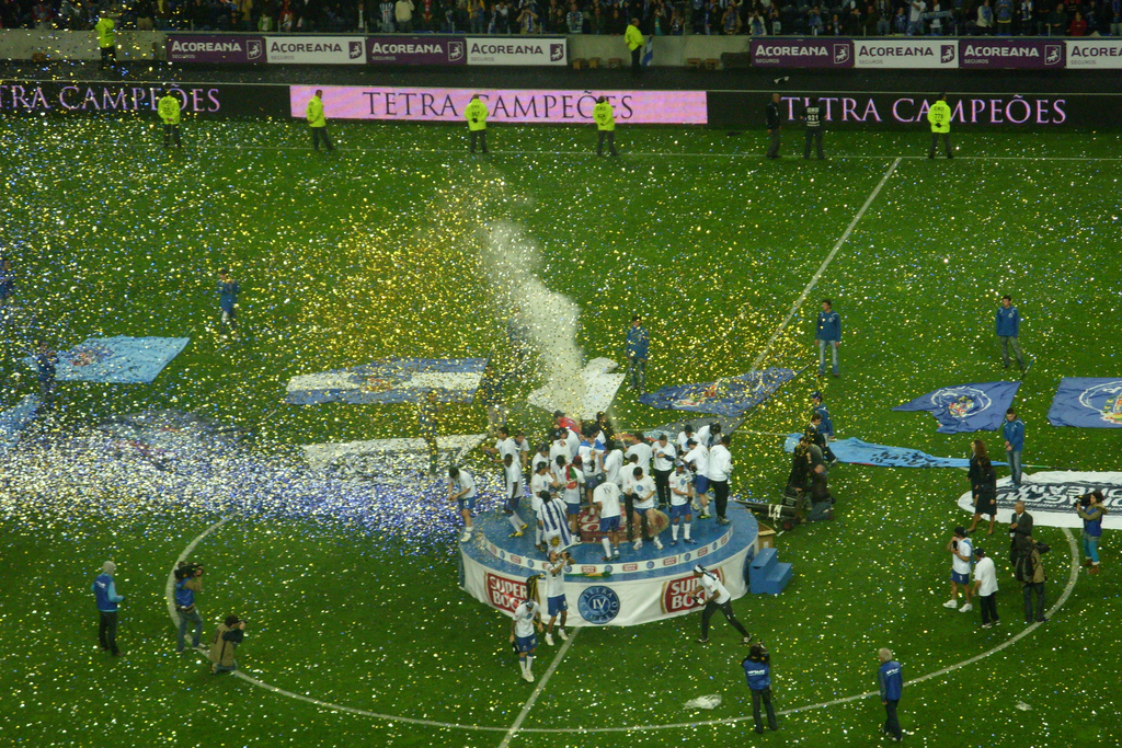 Tetra 010